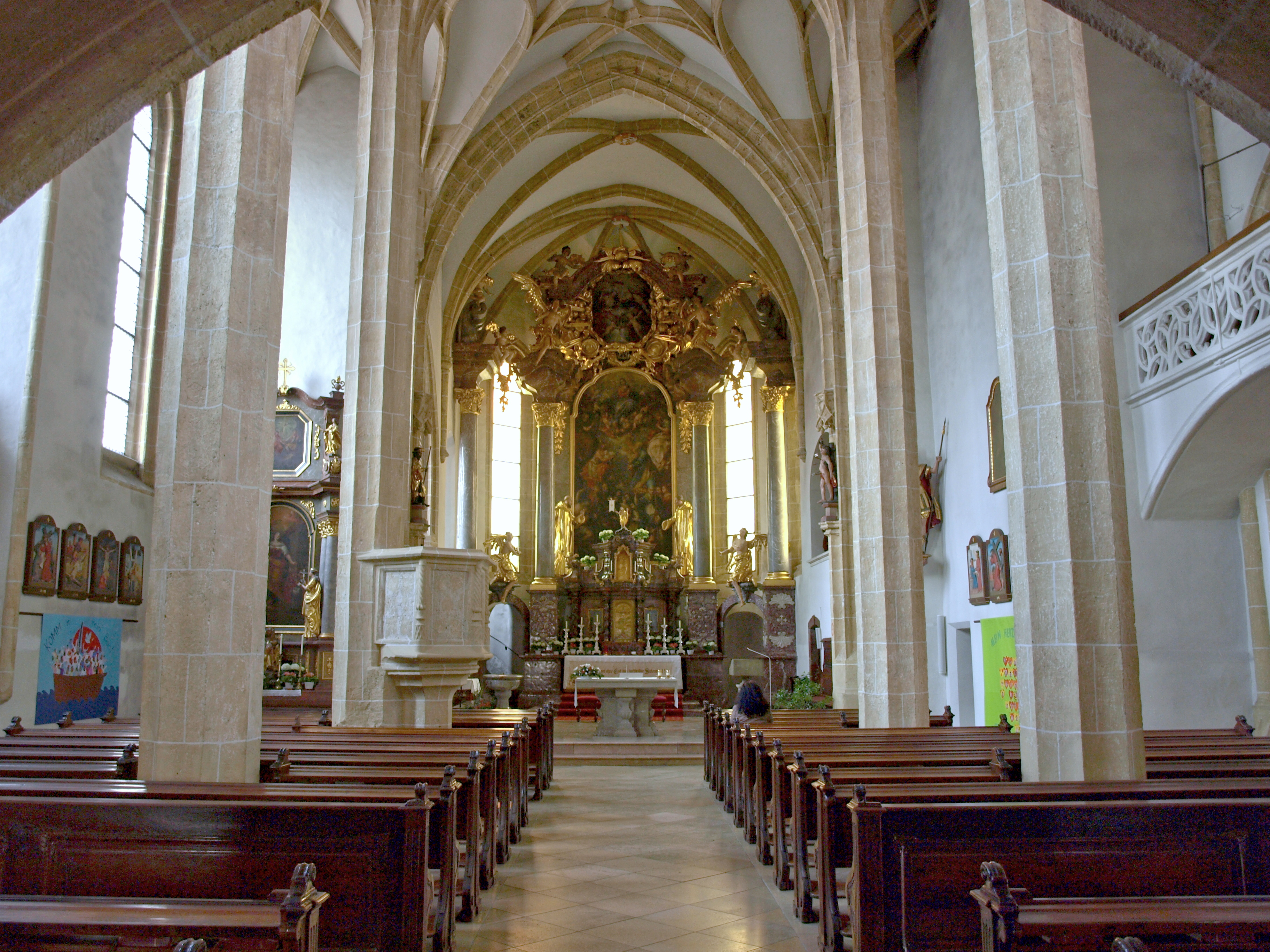 Kath. Pfarrkirche hl. Johannes der Täufer